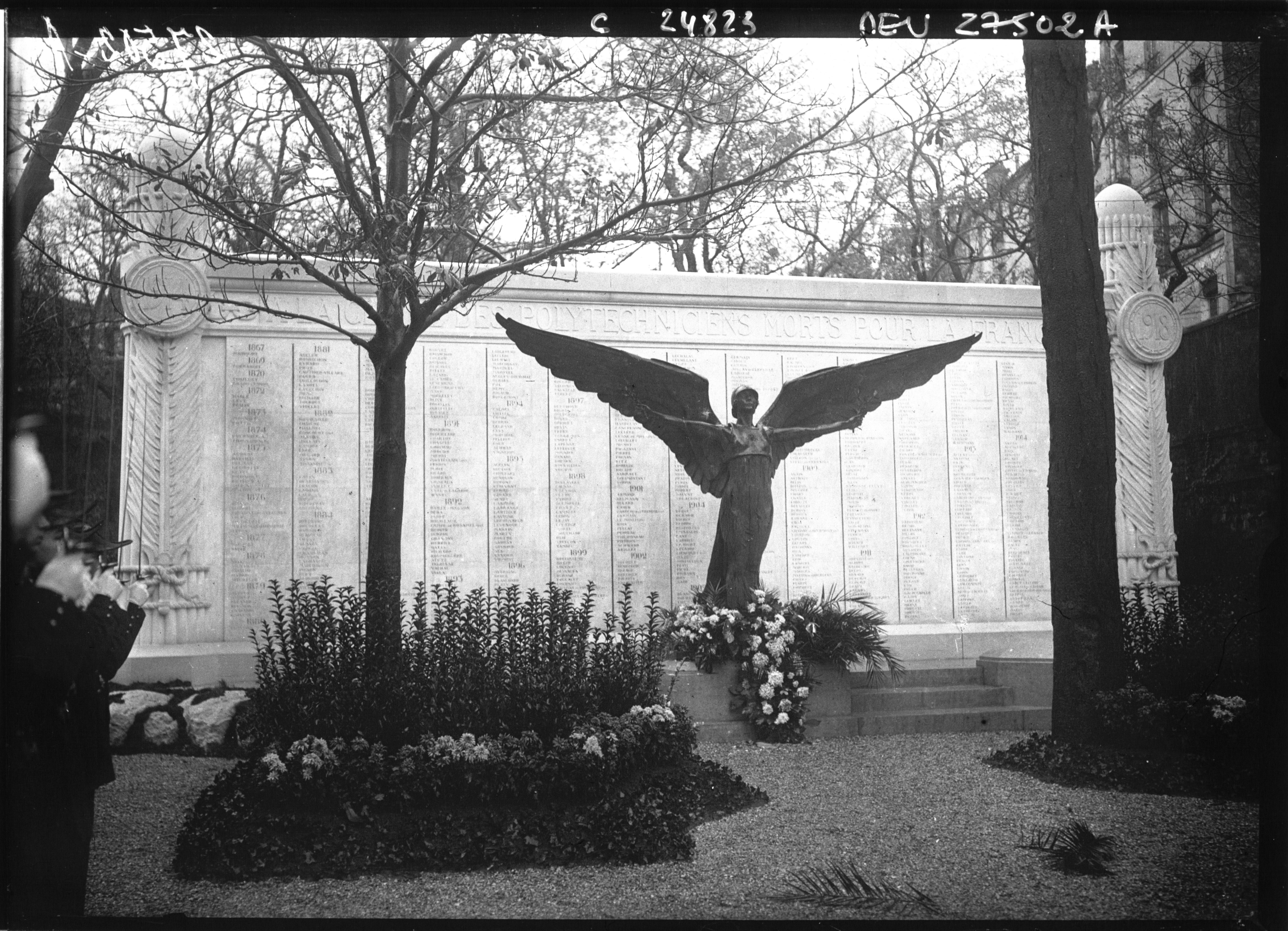 Inauguration du monument Polytechnique : le monument 1 photogr. nég. sur verre ; 13 x 18 cm (sup.) ou moins